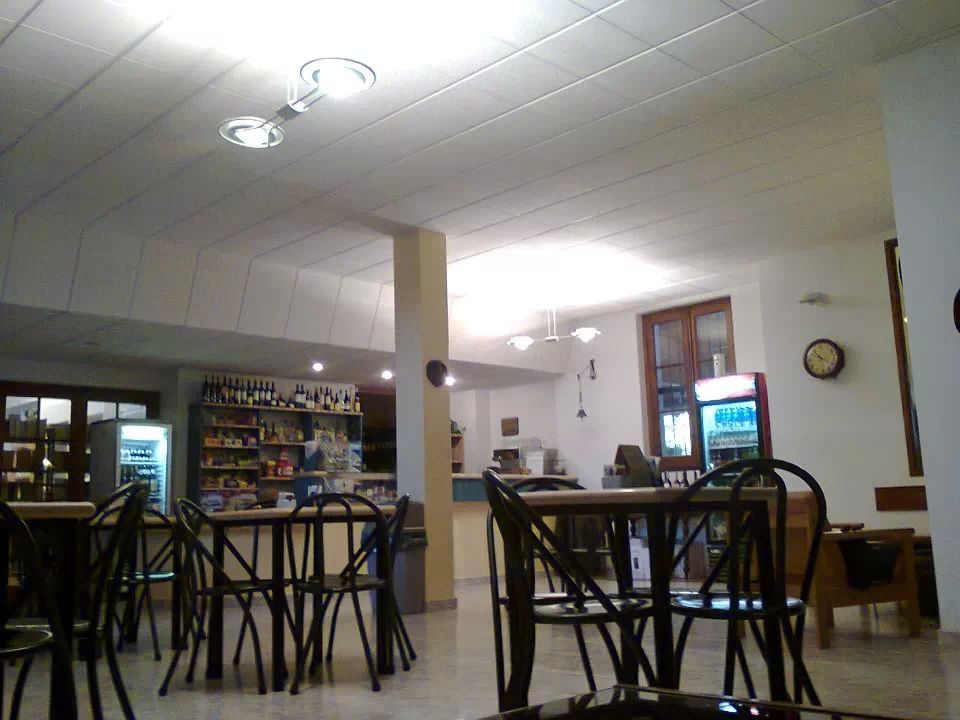 Bar da Casa Betânia em Campo Verde